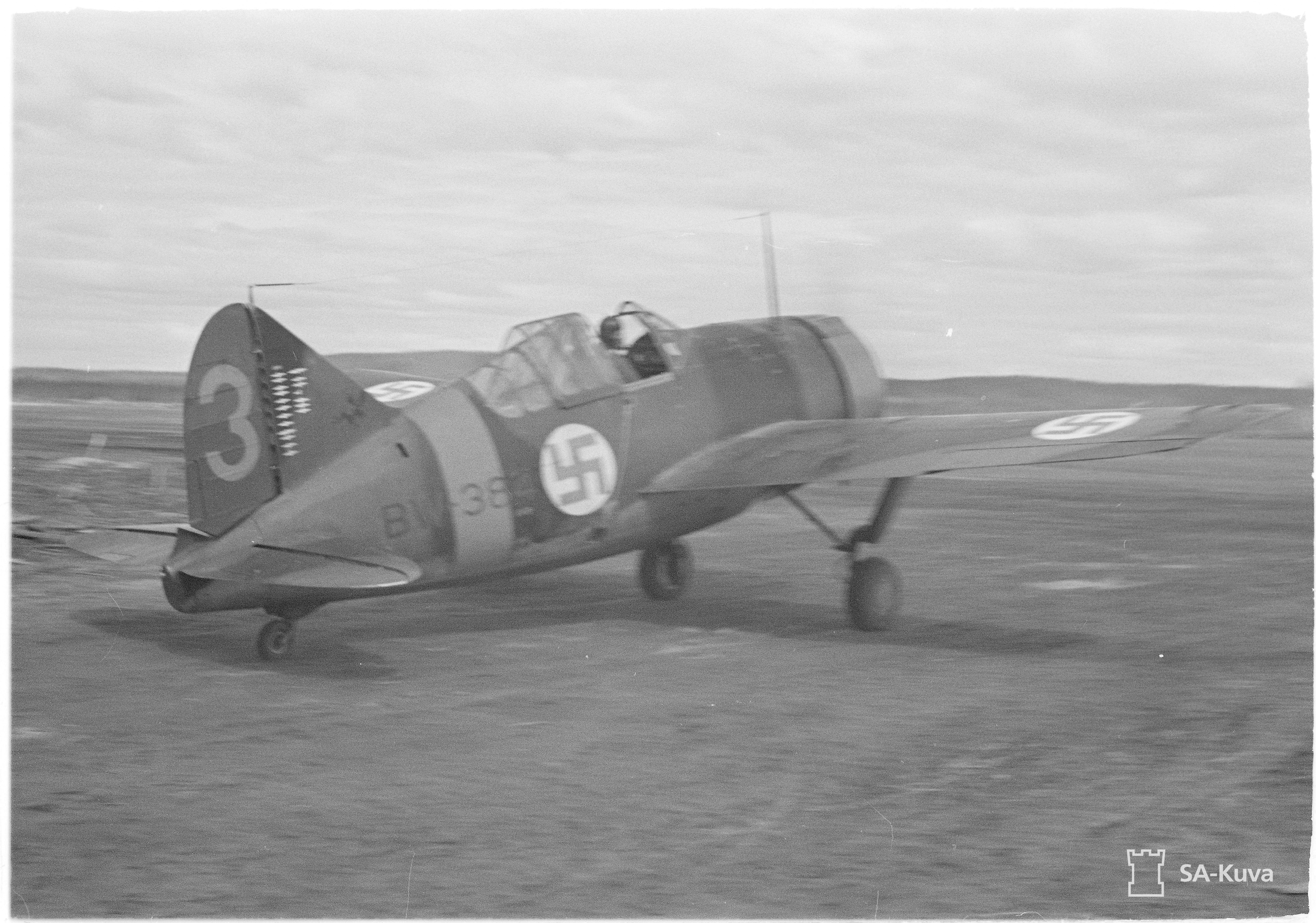 Mannerheim-ristin ritari Vänrikki Lauri Nissinen lähdössä lentoon BW-384-koneellaan 25.5.1942